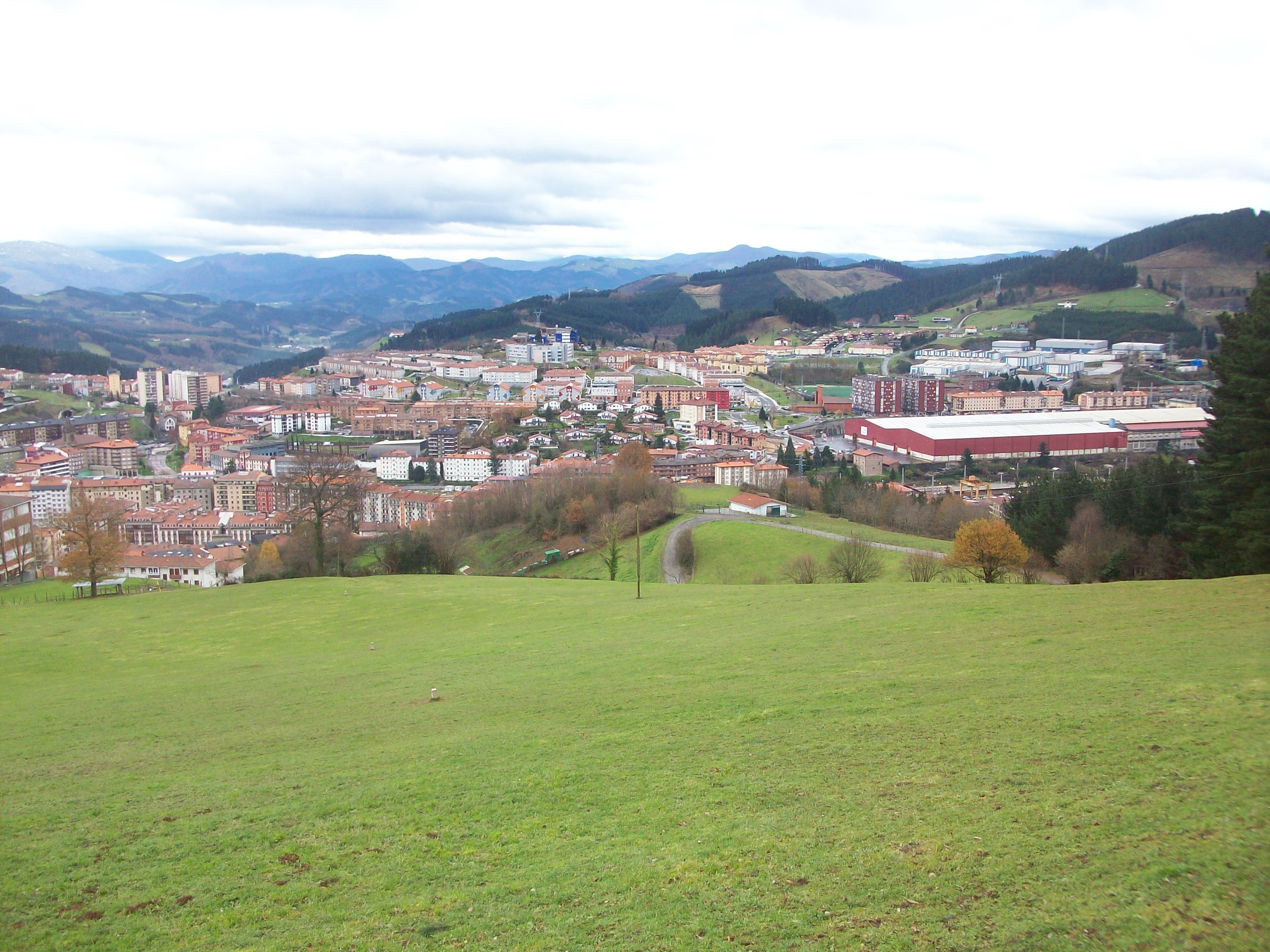 Zumarragaren ikuspegia. Gipuzkoa, Euskal Herria.